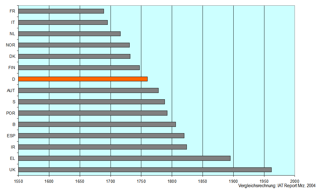 Information Gewöhnliche Arbeitszeit wichtiger OECD-Länder nach IAT 2003